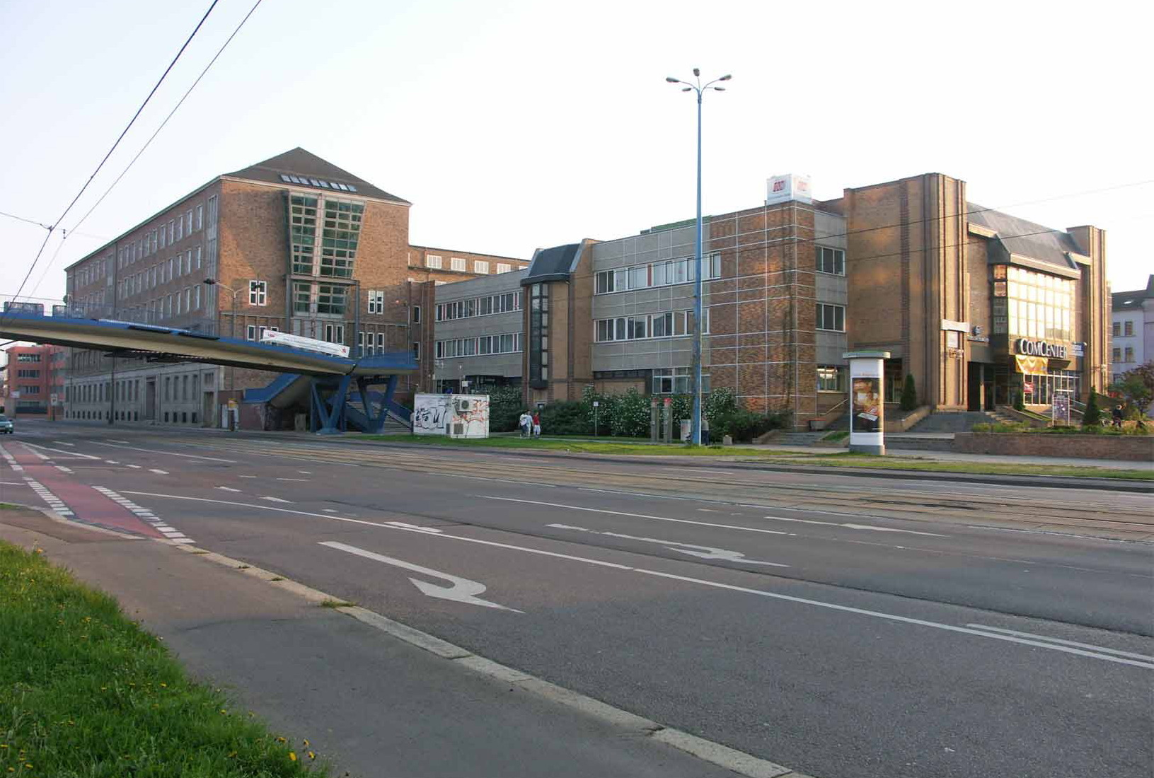 Gebäude der SED-Bezirksleitung Halle, Willy-Brandt-Straße 57, Ecke Merseburger Straße (ehem. Leninallee) / Willy-Brandt-Straße (ehem. Philipp-Müller-Straße), ursprüngl. Altbau als Sitz der Chemiearbeitgeber gebaut, Anbau in den frühen 1980er Jahren, Spitzname "Cafe Böhme" in Anlehnung an den damaligen SED-Bezirkssekretär; Nutzung nach 1990: Altbau (heute Merseburger Straße 2) für Statistisches Landesamt LSA (Stala), Neubau als "ComCenter" Mischnutzung als Geschäfts- und Bürohaus; eigenes Foto 04-05-2006 Bettenburg